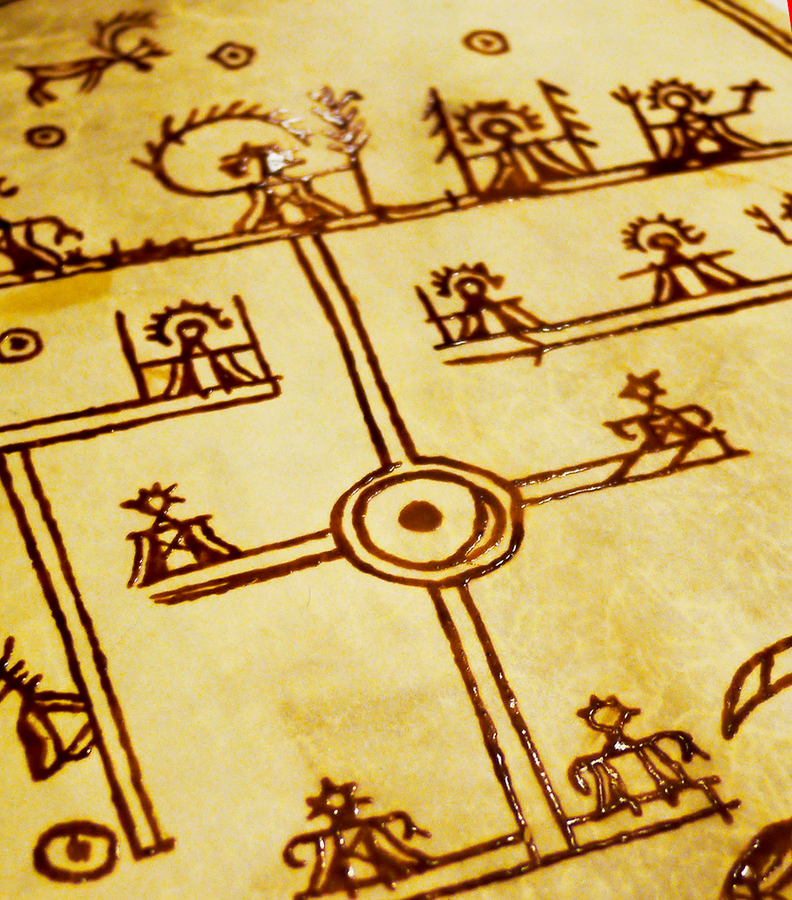 Details einer sámischen Zaubertrommel. Ausgestellt im Árran-Museum (Ájluokta, Norwegen)